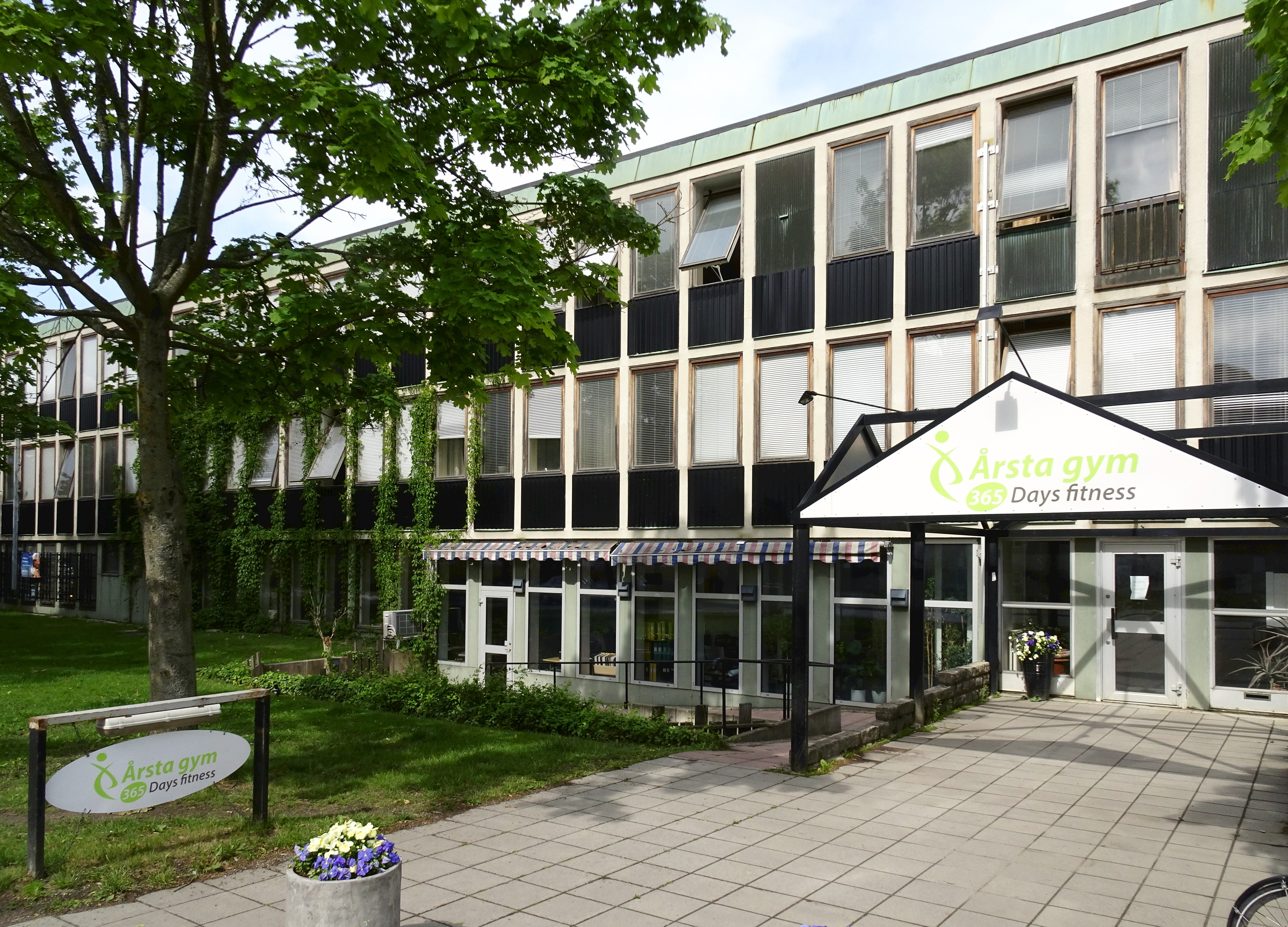 Fastigheten Marman 7, sedd från Svärdlångsvägen, Årsta, arkitekt Kaleb Sjödén